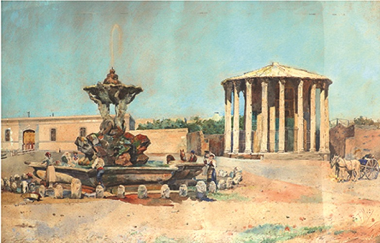 Tempio di Vesta, acquarello su carta, cm. 65 × 100, coll. privata